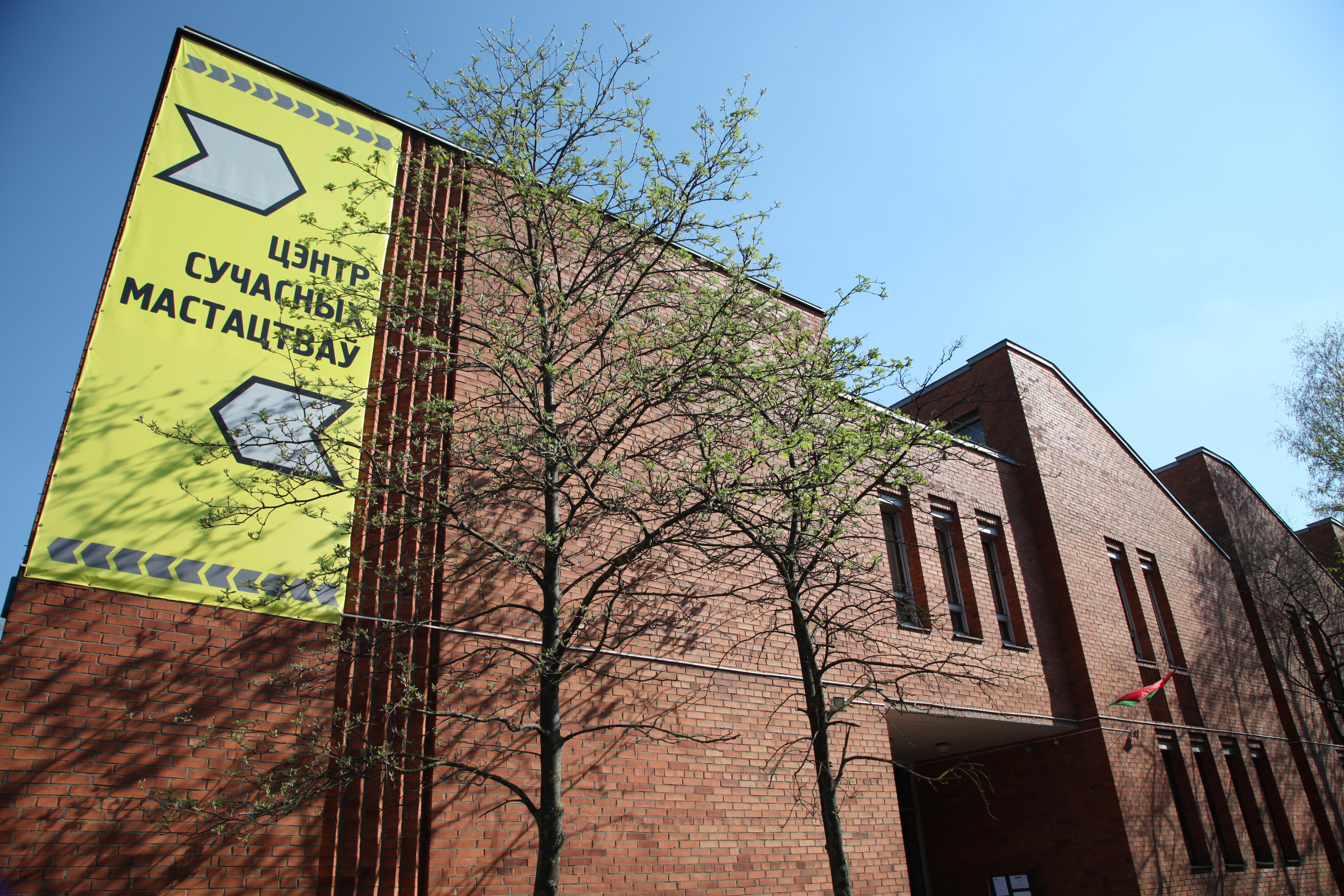 фасад Национального центра современного искусства